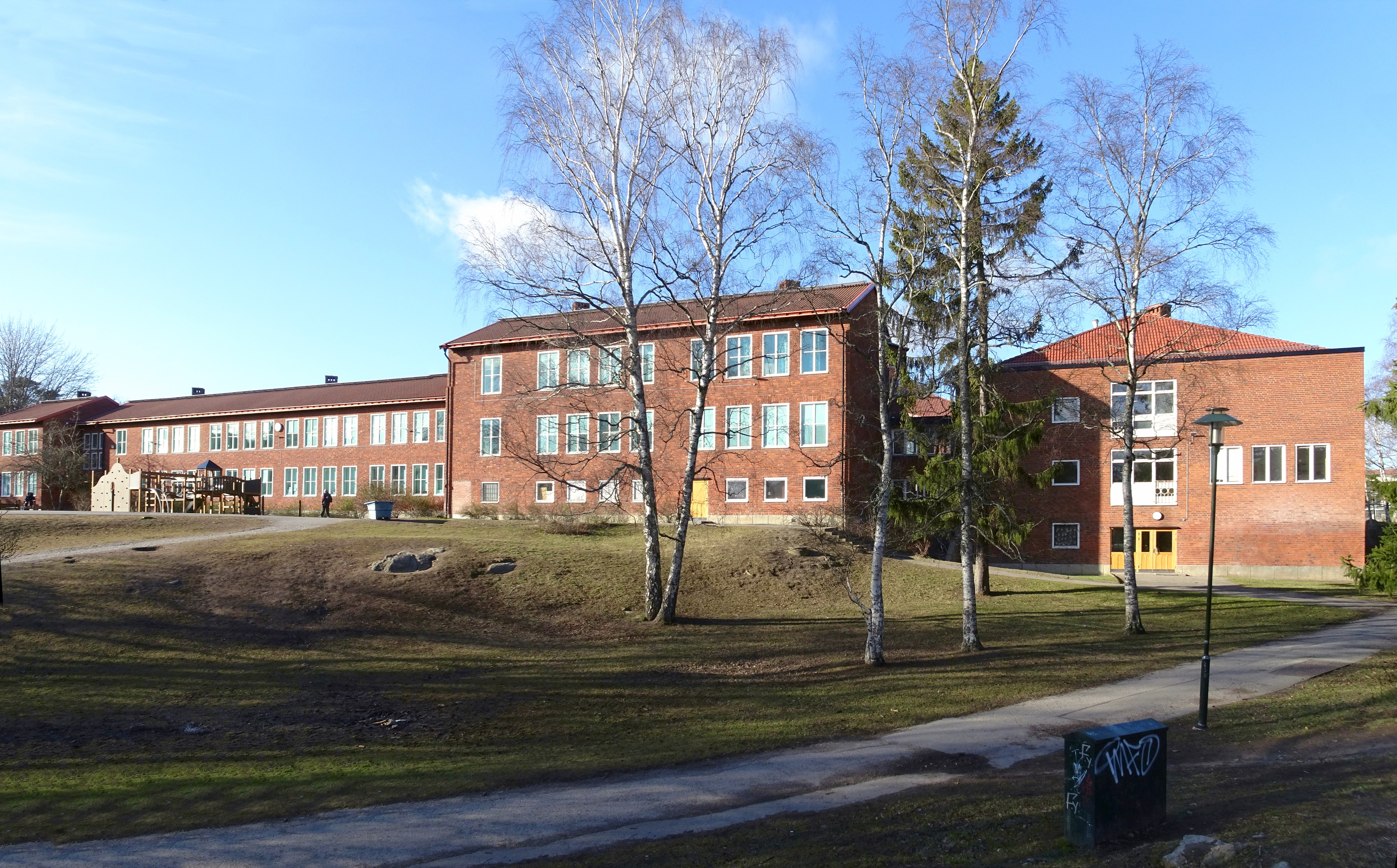 Bäckahagens skola. Nybyggnadsår 1953 - 1968. David Dahl (Arkitekt), Stockholms Folkskoledirektion (Byggherre), Svenska Väg Aktiebolag (Byggmästare)